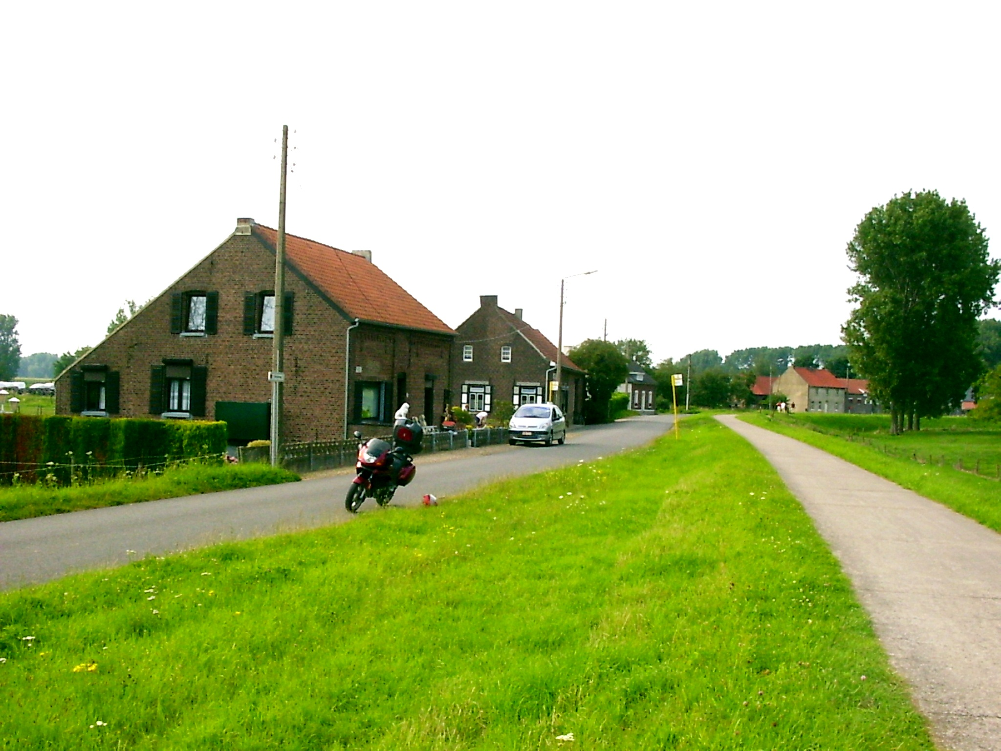 Foto van Boyen, gehucht van Dilsen-Stokkem - eigen werk